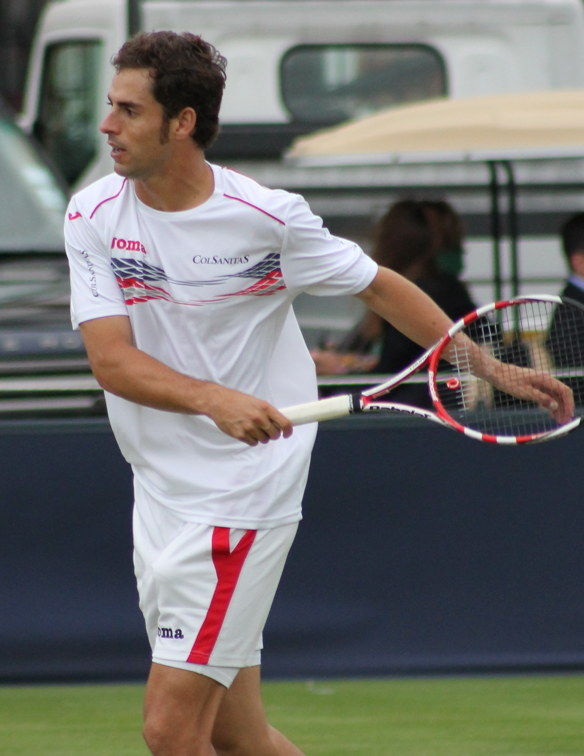 Giraldo QC13-008